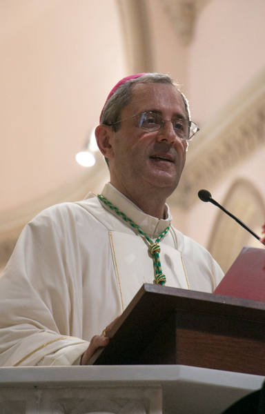 l'arcivescovo Francescantonio Nolè il giorno del suo insediamento a Cosenza